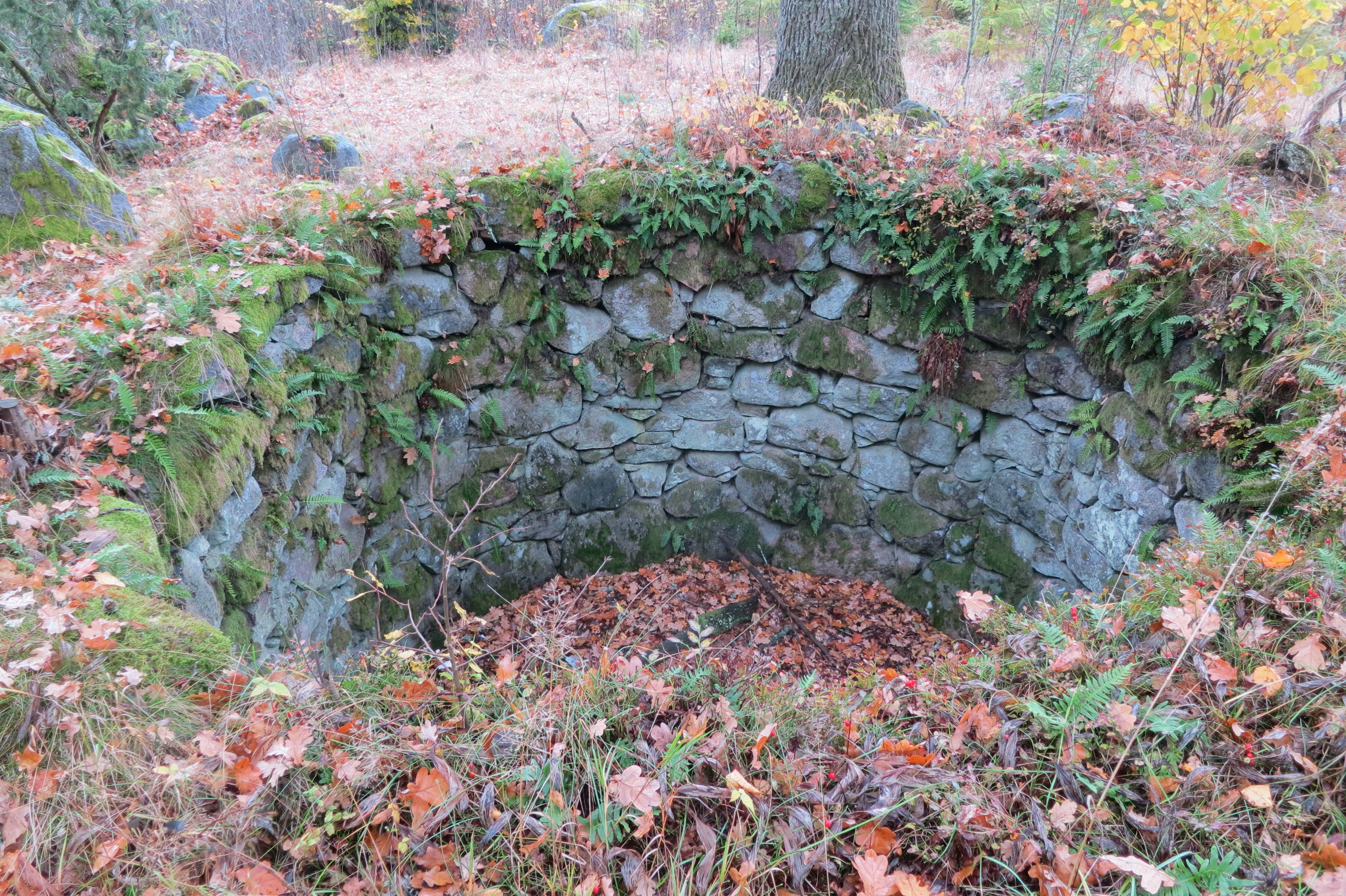 Varggropen i Södra Sandsjö socken